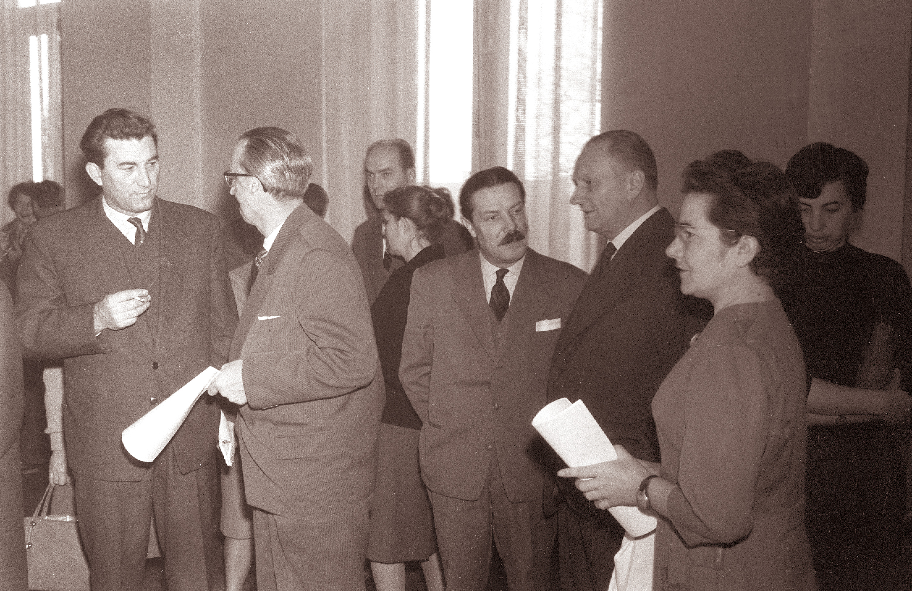 Delegati v razgovoru pred pričetkom konference SZDL mariborskega okraja